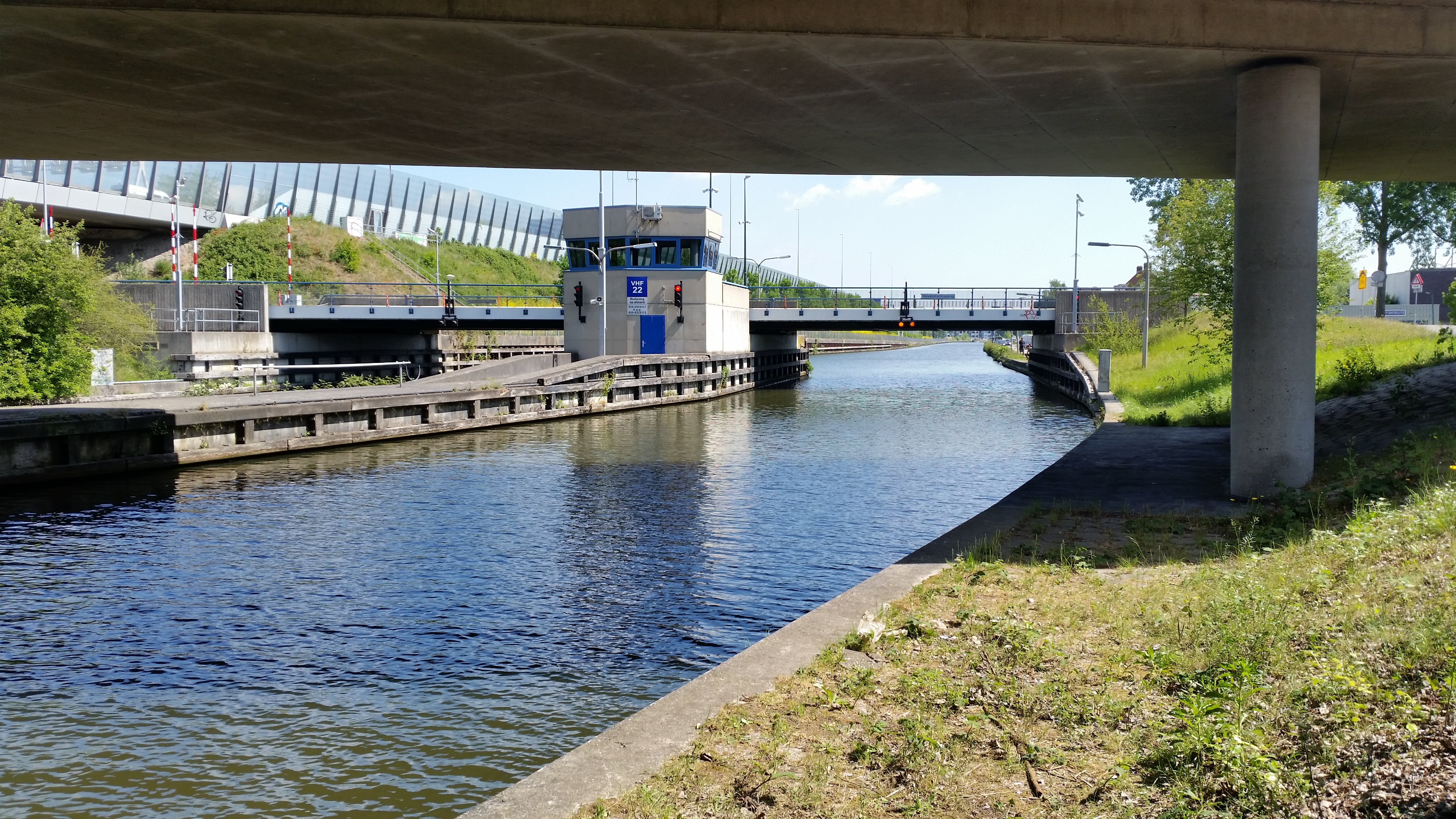 Impressie van de 1988-versie van de Duivendrechtsbrug (brug 1267) op de grens Amsterdam en Ouder-Amstel